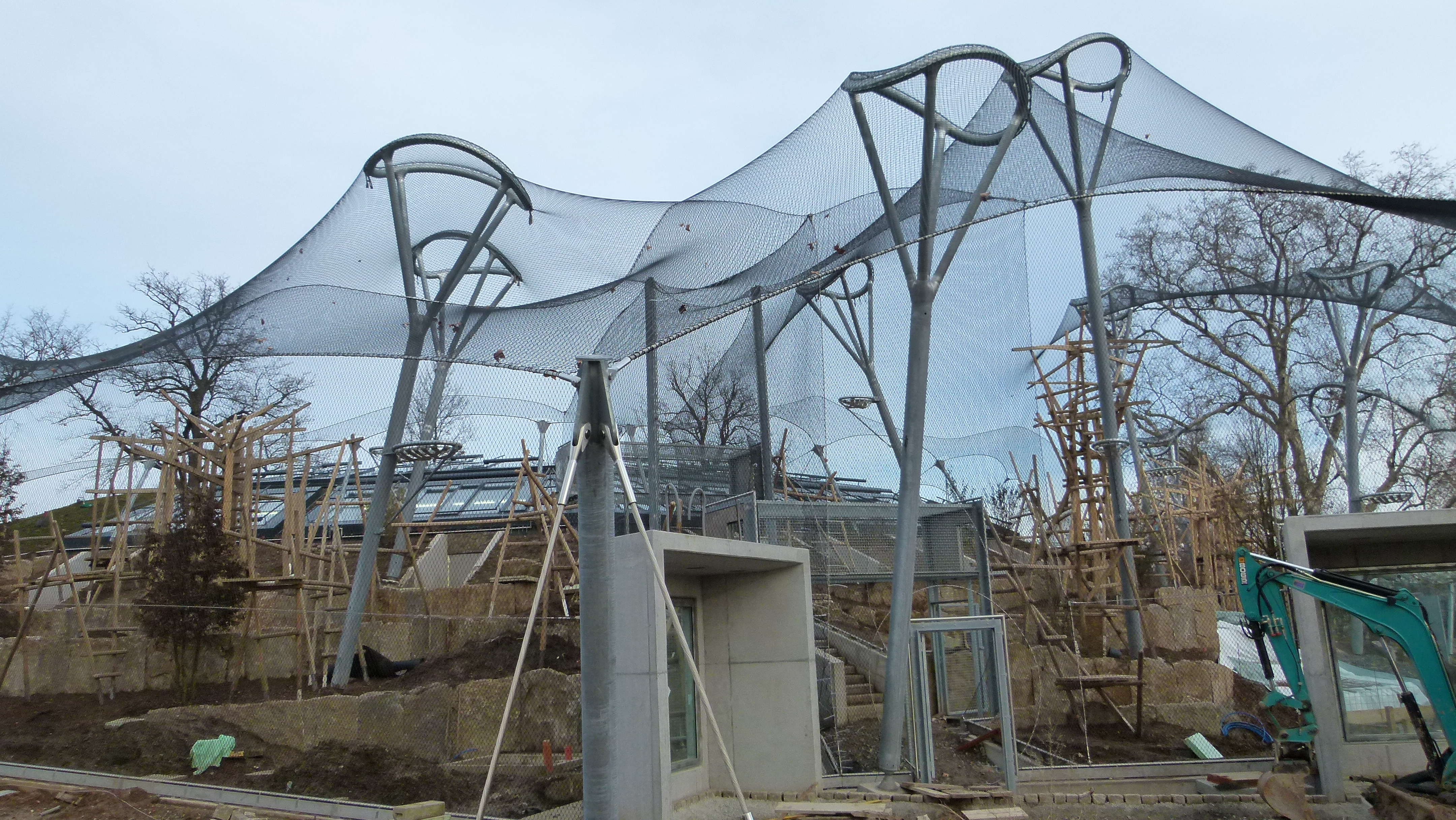 Wilhelma Menschenaffenhaus Baustelle im Dezember 2012, Stuttgart